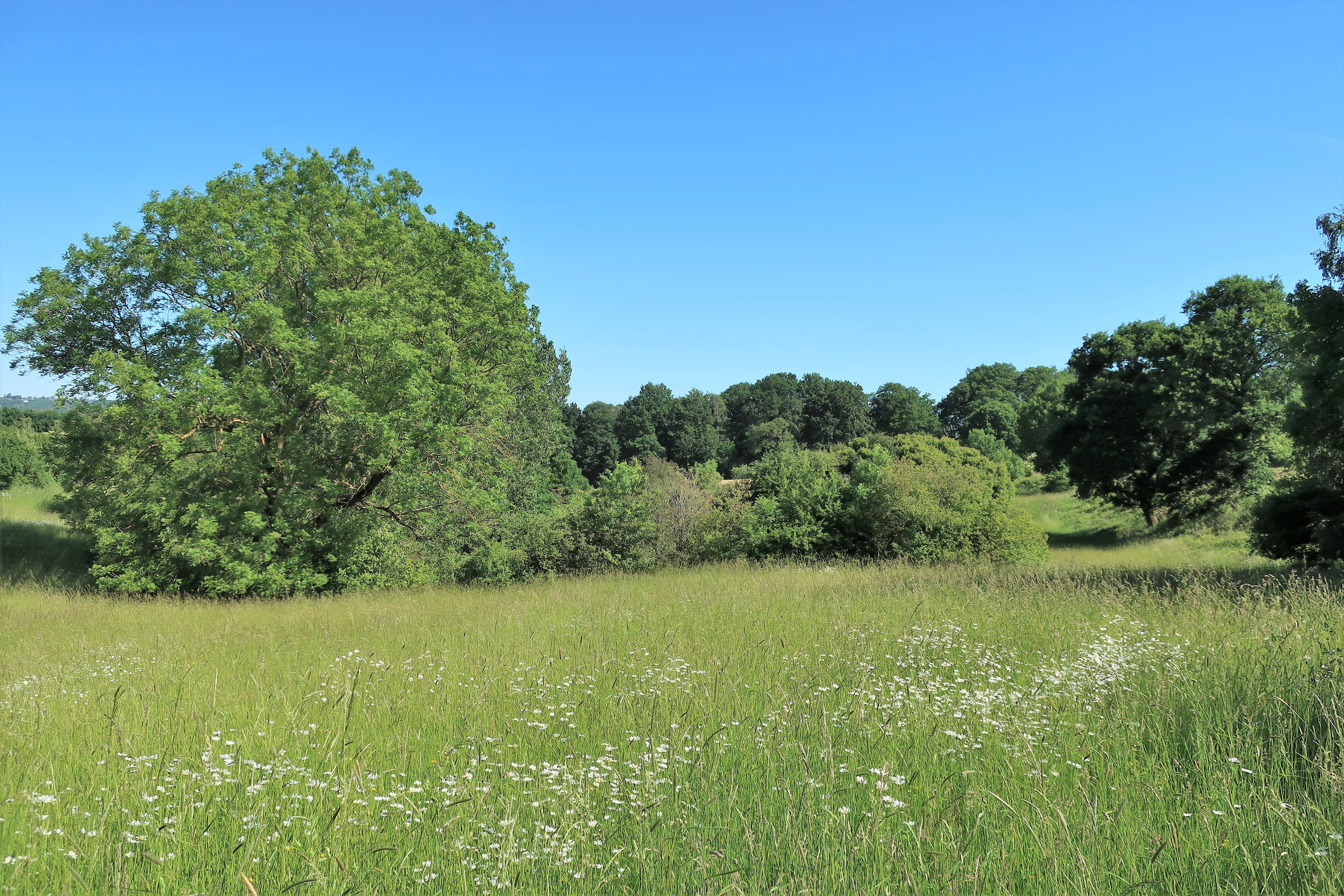 Geschützter Landschaftsbestandteil 1.4.2.4 „Bachaue Steinberg“ in Hagen-Garenfeld, westlich der Villigster Straße, östlich von Garenfeld. Es umfasst den Oberlauf des Steinbergbaches einschließlich der Wiesenaue.